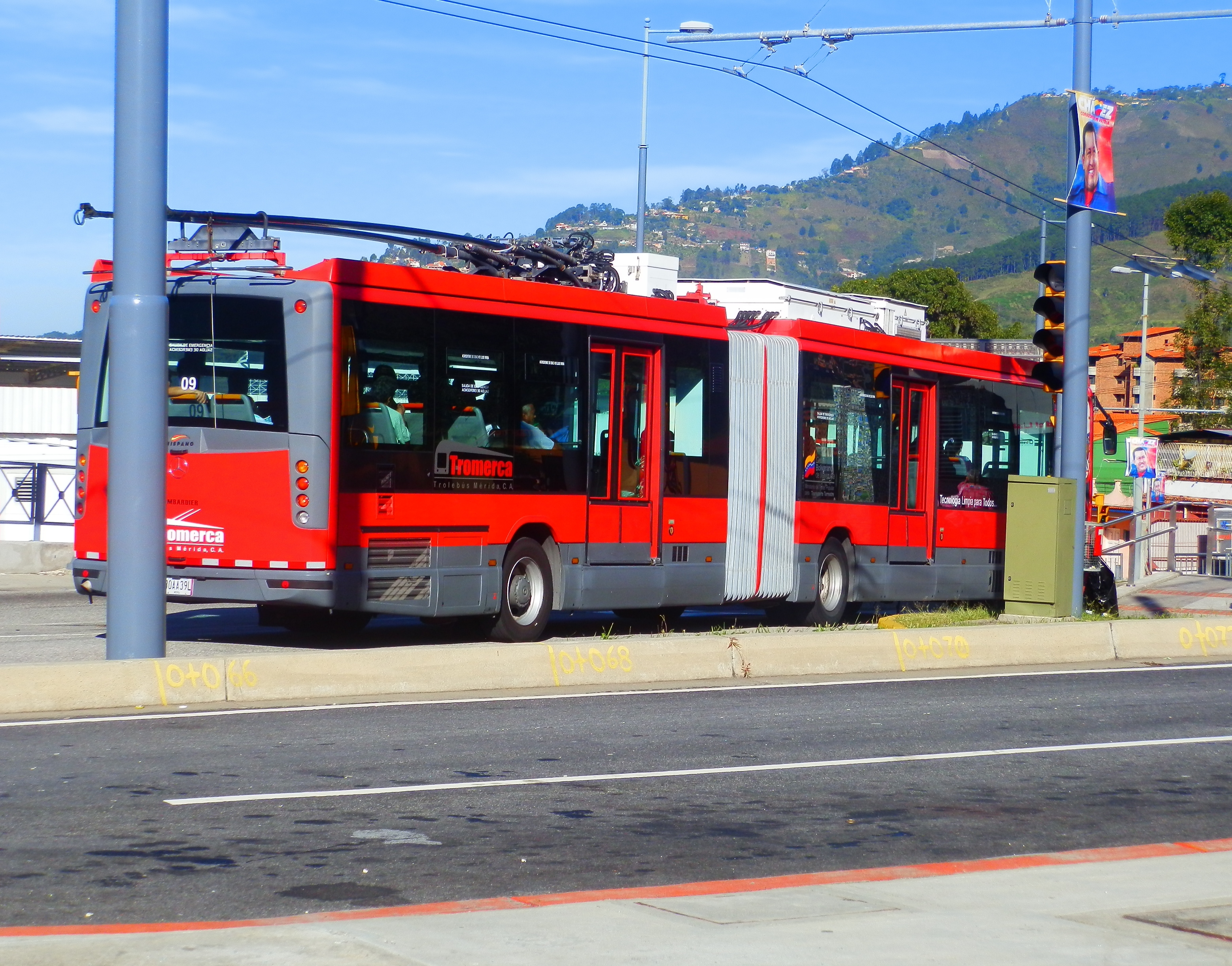 Trolebús de Mérida en funcionamiento